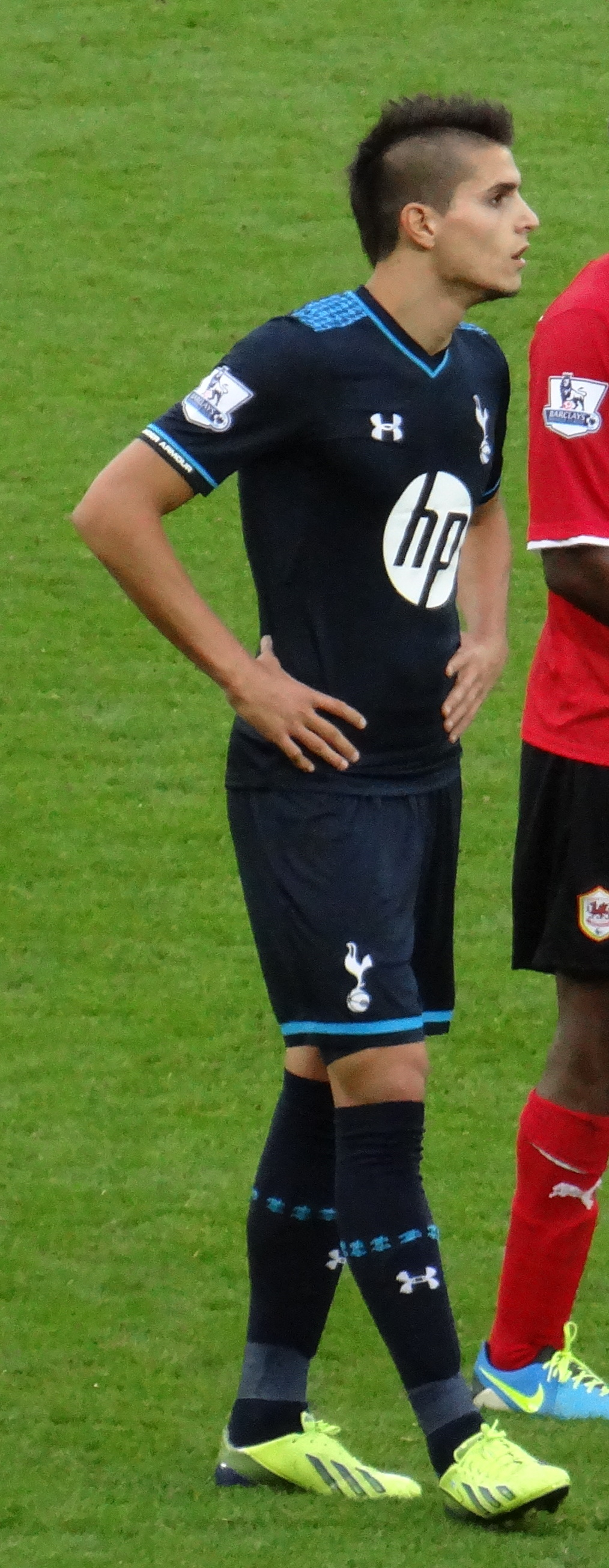 Erik Lamela playing for Tottenham Hotspur in 2013